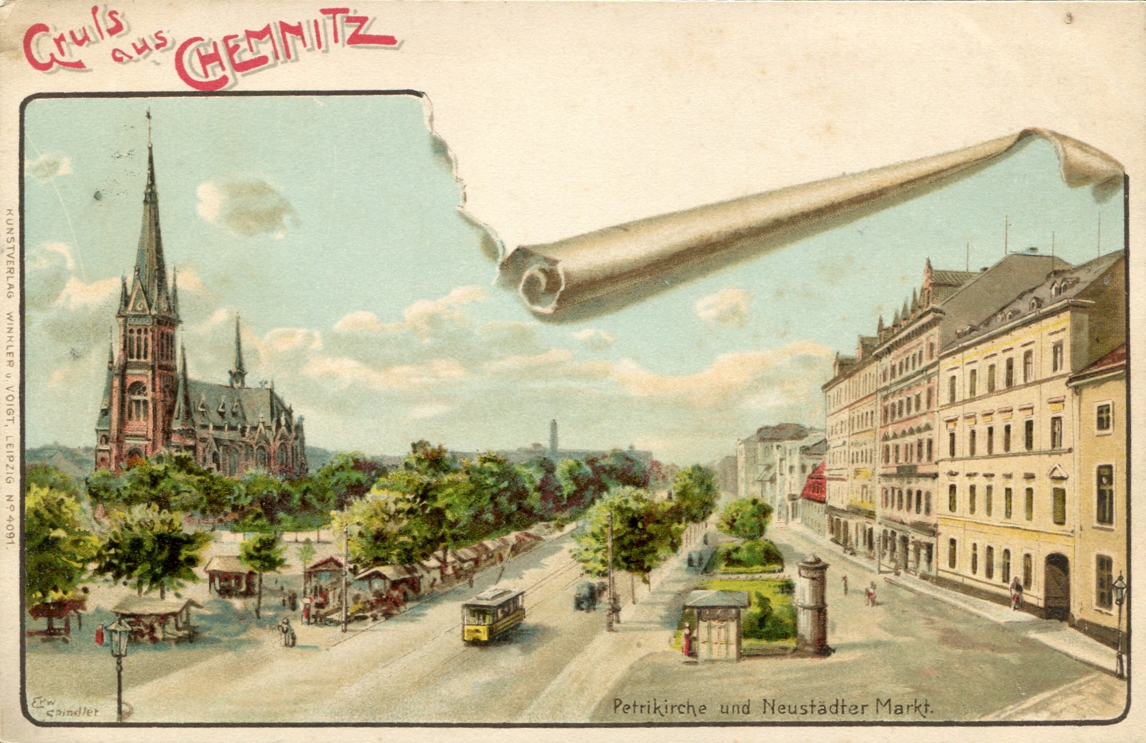 Titel: Gruss aus CHEMNITZ, Petrikirche und Neustädter Markt; Kartennummer: 4091; Signatur: Erw.Spindler; Signaturlage: links unten